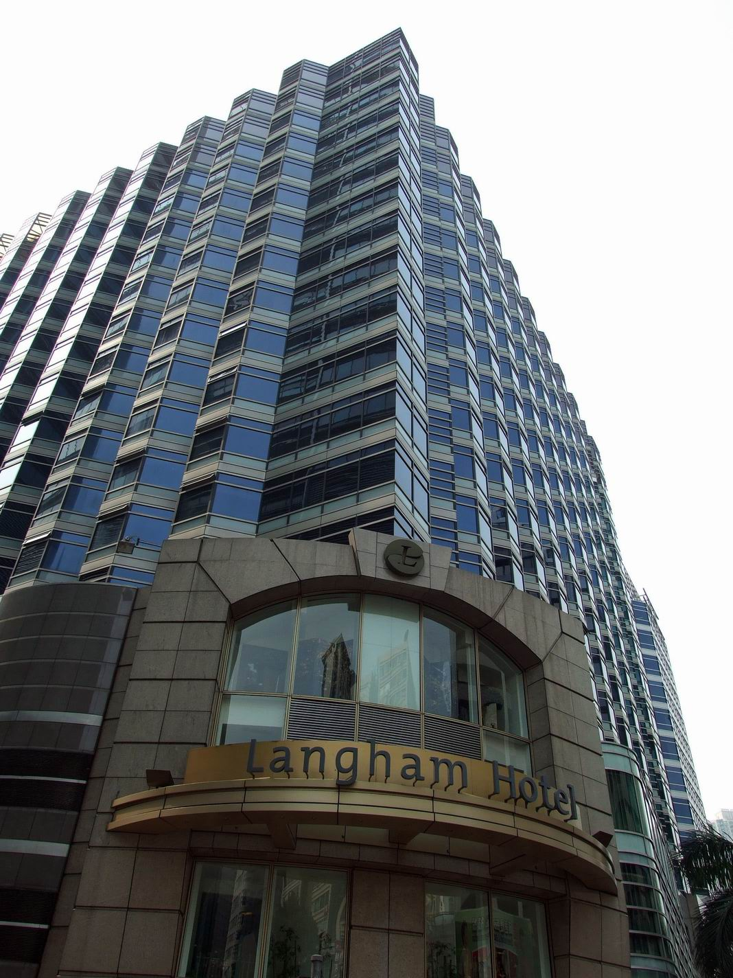 香港朗廷酒店